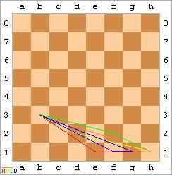 Grafik für SchachmathematikG) Sonstiges: Verbesserung wäre willkommen!